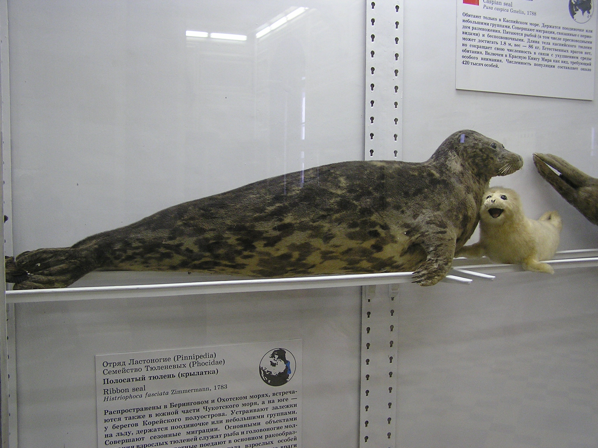 Зоологический музей в Санкт-Петербурге. Каспийский тюлень